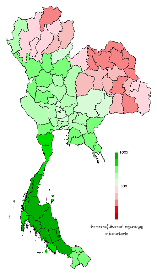 Resultados por provincias del referendum constitucional de Tailandia de 2007